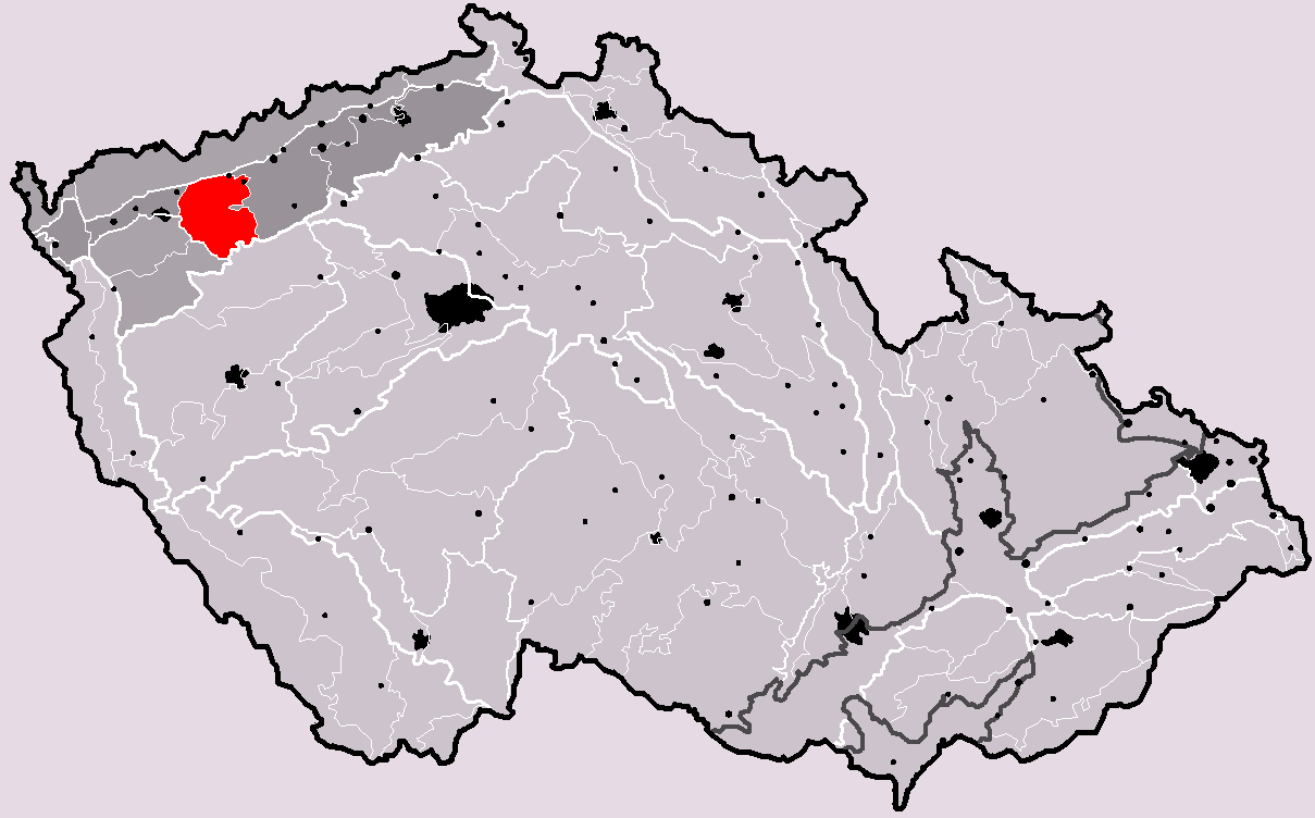 Poloha geomorfologického celku Doupovské hory v rámci České republiky. Hercynský systém Hercynská pohoří I Česká vysočina I3 (III) Krušnohorská subprovincie I3B (IIIB) Podkrušnohorská oblast I3B-4 (IIIB-4) Doupovské hory